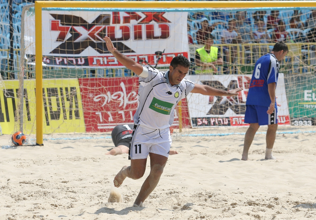 אלון מזרחי "האווירון" אחרי גול במשחק בליגת הכדורגל חופים נתניה 2007